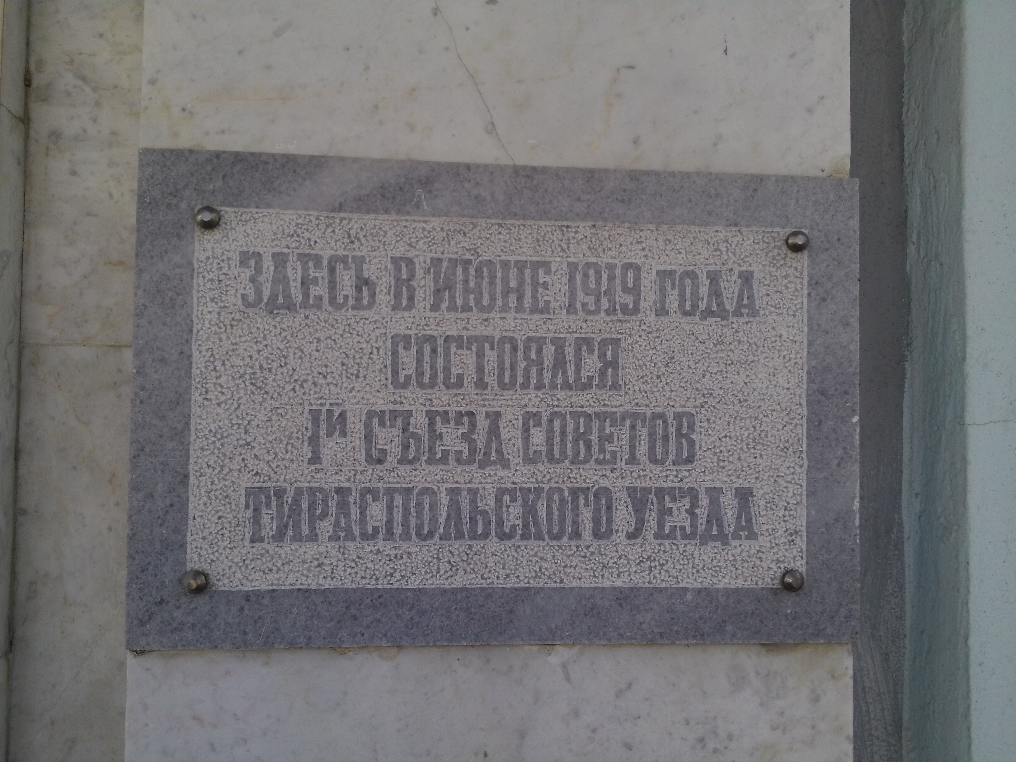 Тираспольский музей. Памятная табличка о первом съезде Советов Тираспольского уезда